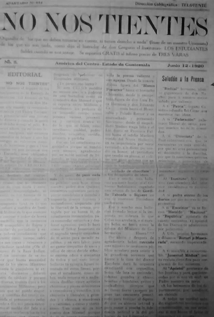 Pimera plana del No Nos Tientes de 1920.